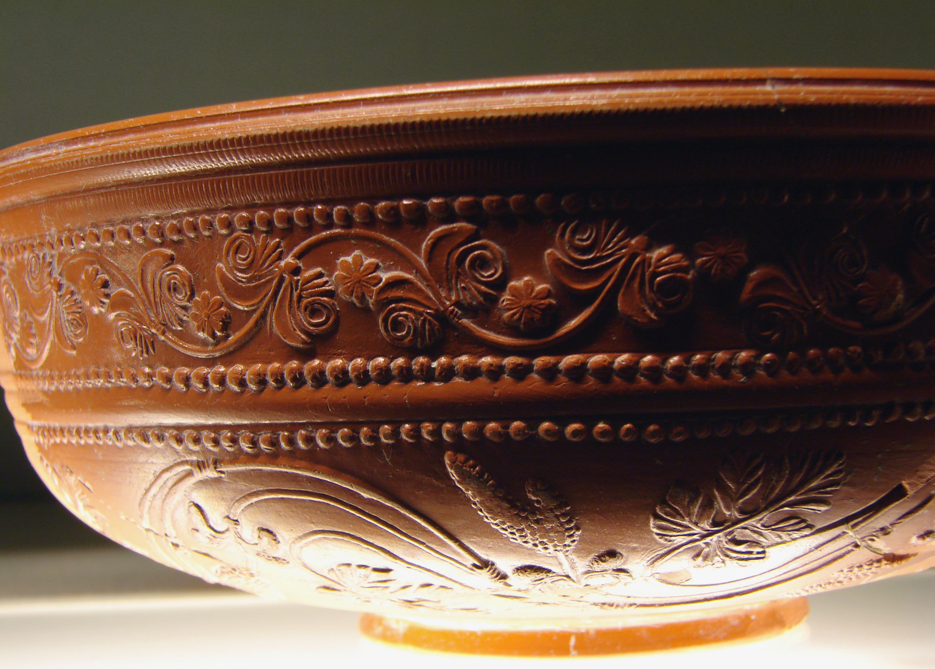 Céramique sigillée, époque gallo-romaine, musées de la Cour d'Or à Metz.